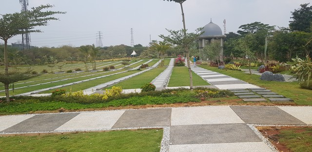 Pemakaman Islam Al Azhar Memorial Garden Karawang